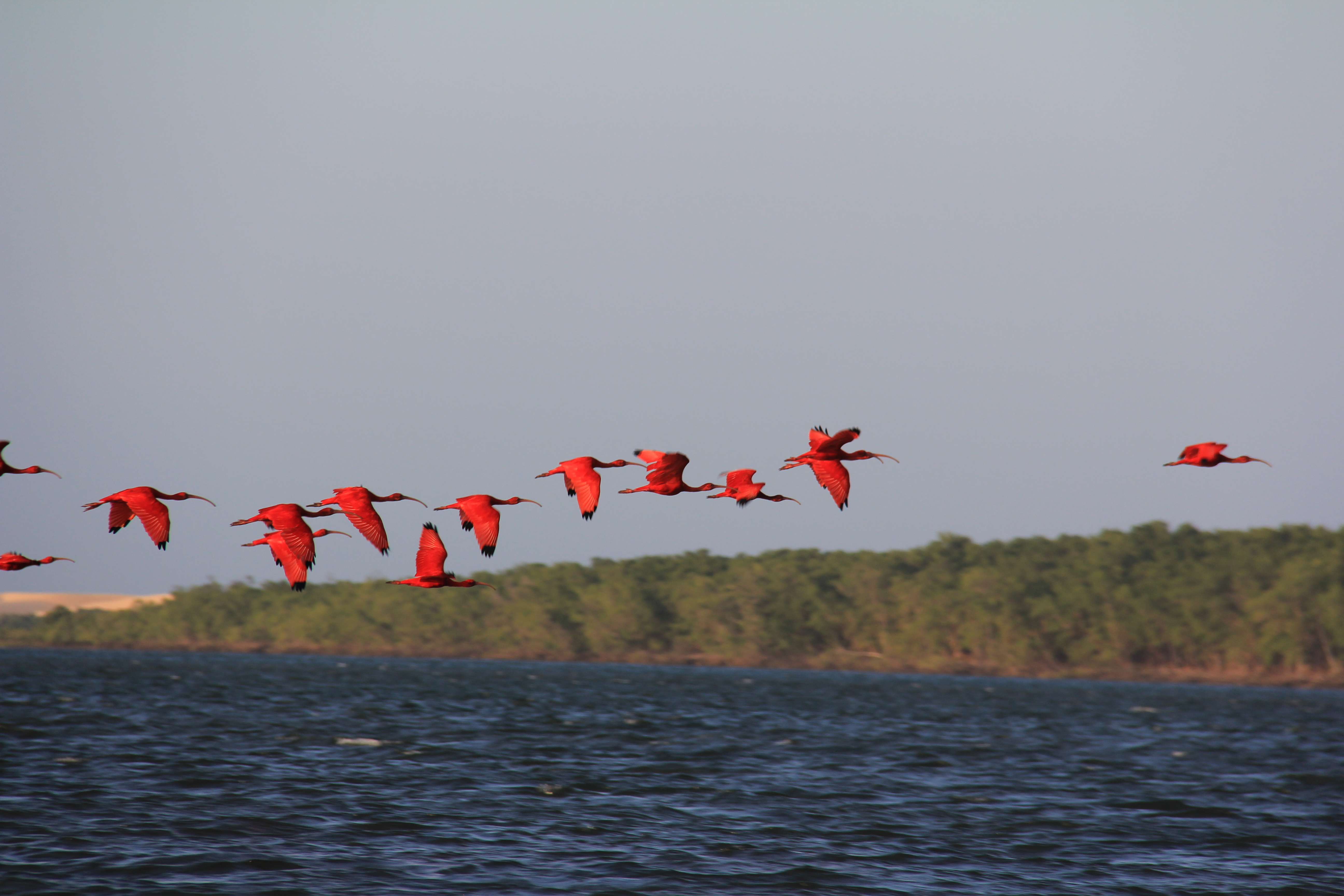 Revoada de guarás nos igarapés do Delta do Paranaíba